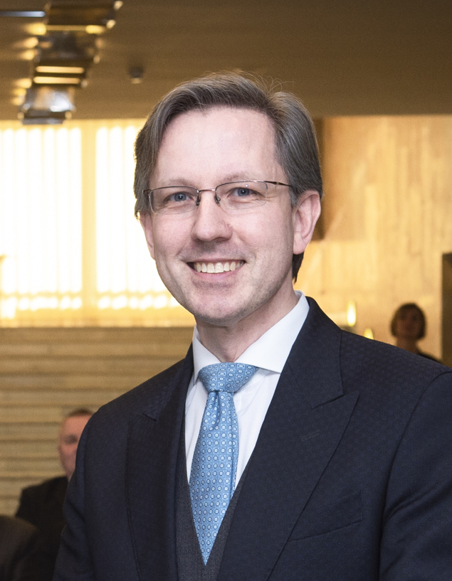 Indrek Laul, välisministeeriumi teeneteristide üleandmine